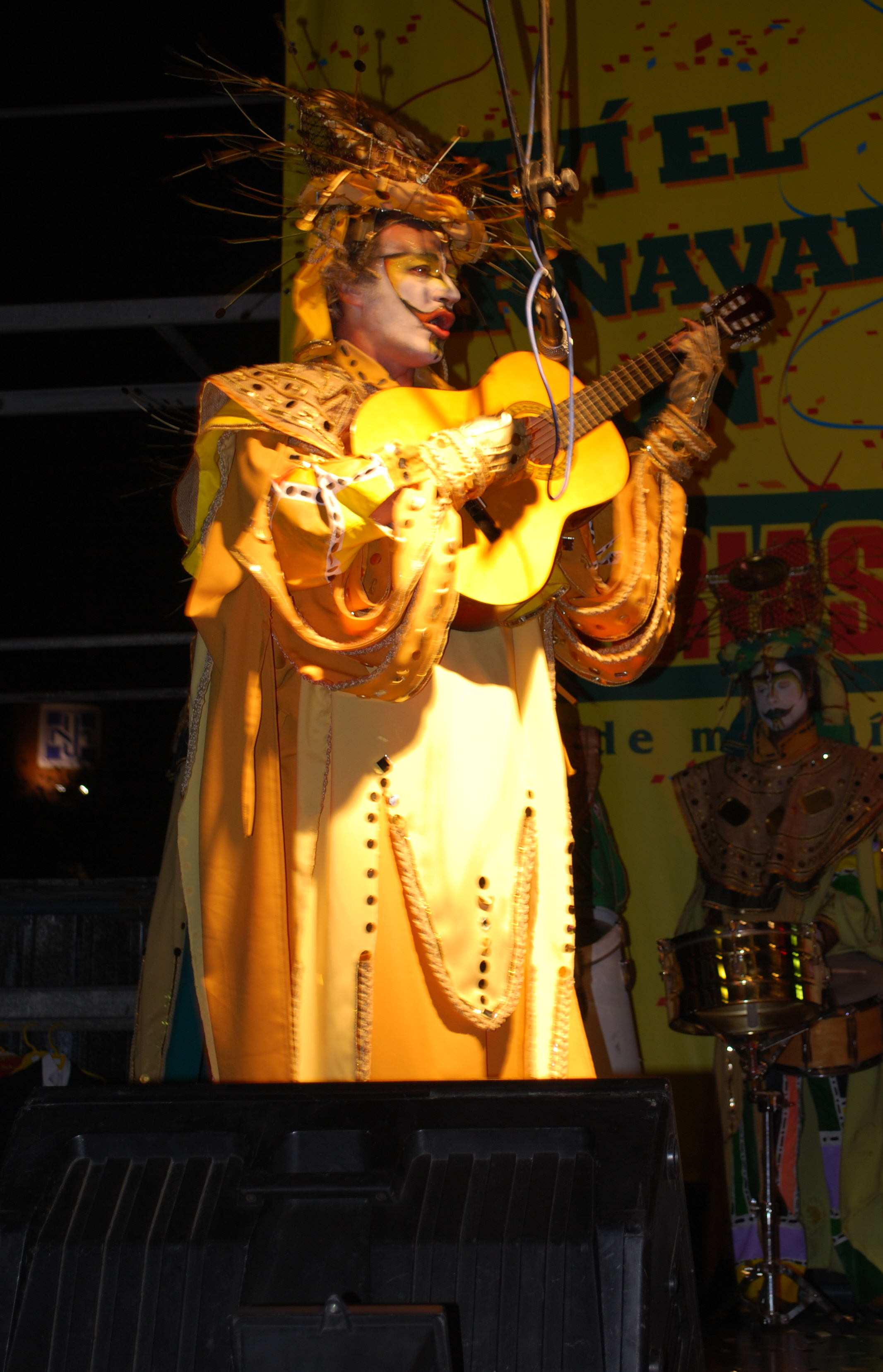 Fotografía del director y letrista de la murga uruguaya "La Gran Siete", Guillermo Lamolle, en la primer actuación oficial del grupo en el Carnaval 2009.